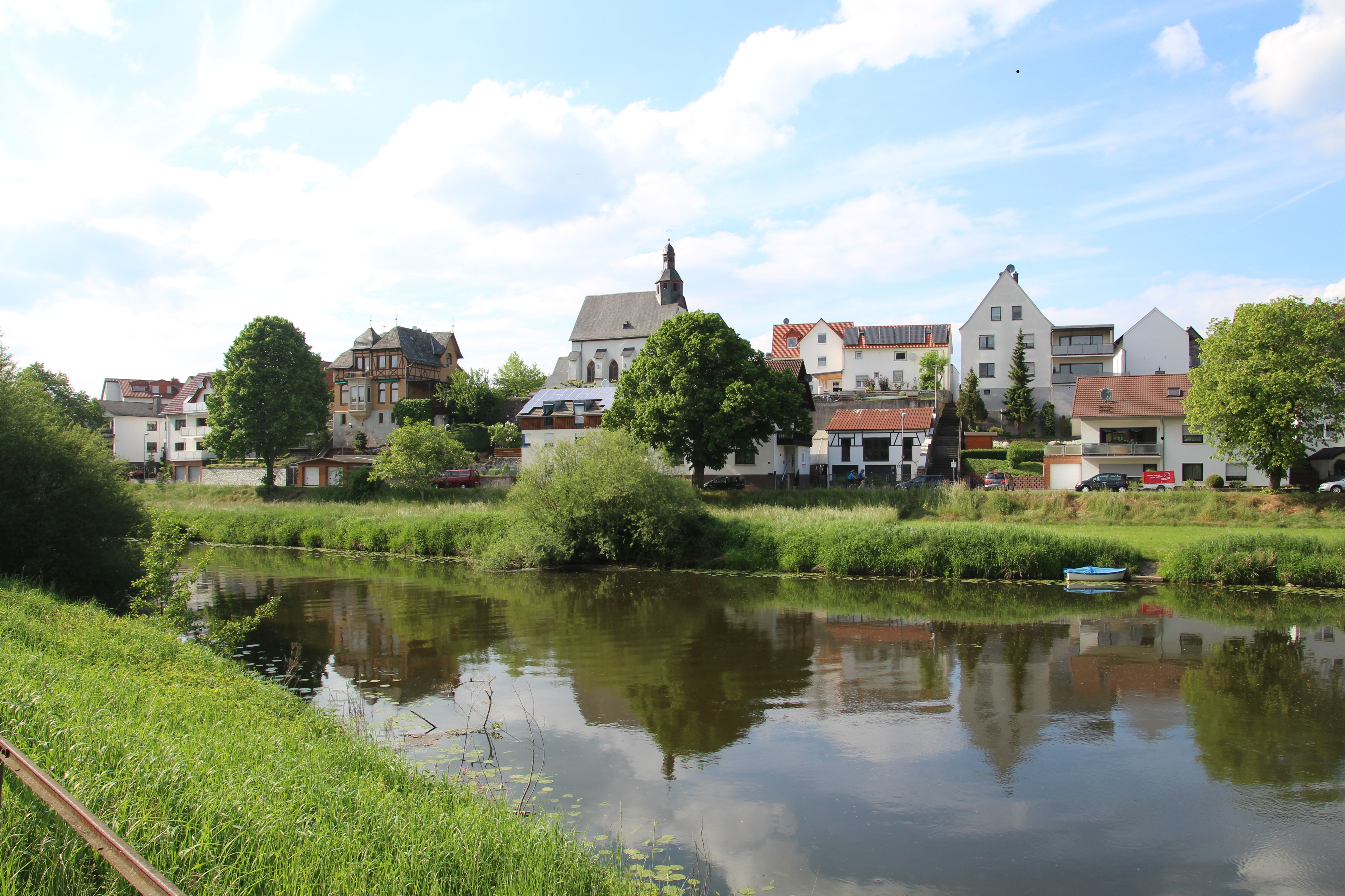 Ehemaliger Klosterzugang - Lahnberg 4